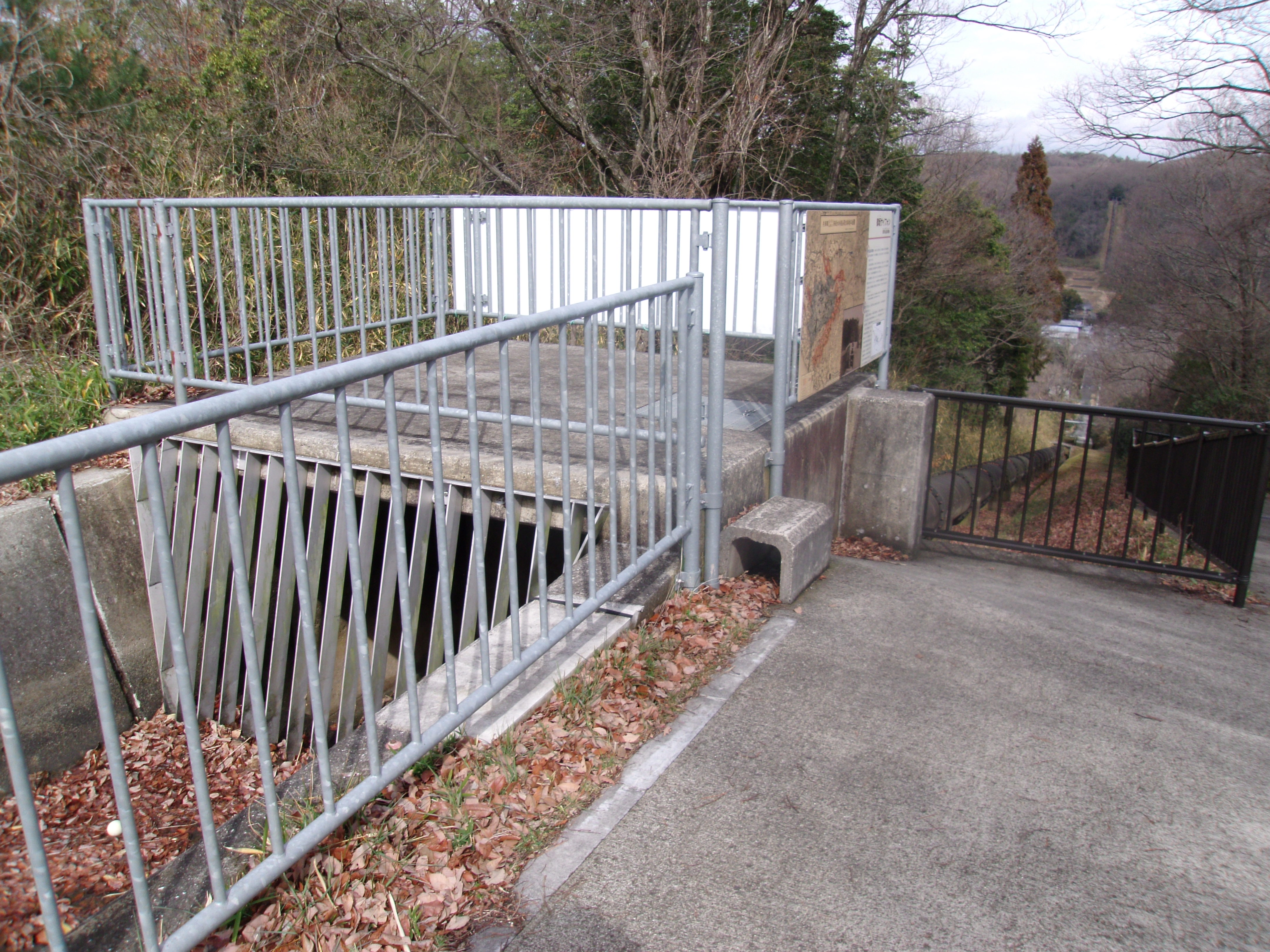 御坂サイフォン橋から再び導水管で斜面を登り三木市総合防災公園に抜けた淡河疎水の吐口